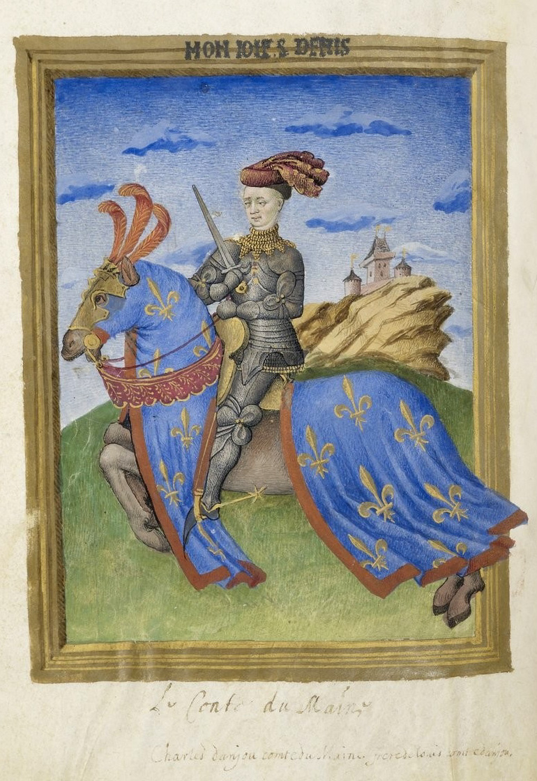 Charles d'Anjou, duc du Maine.